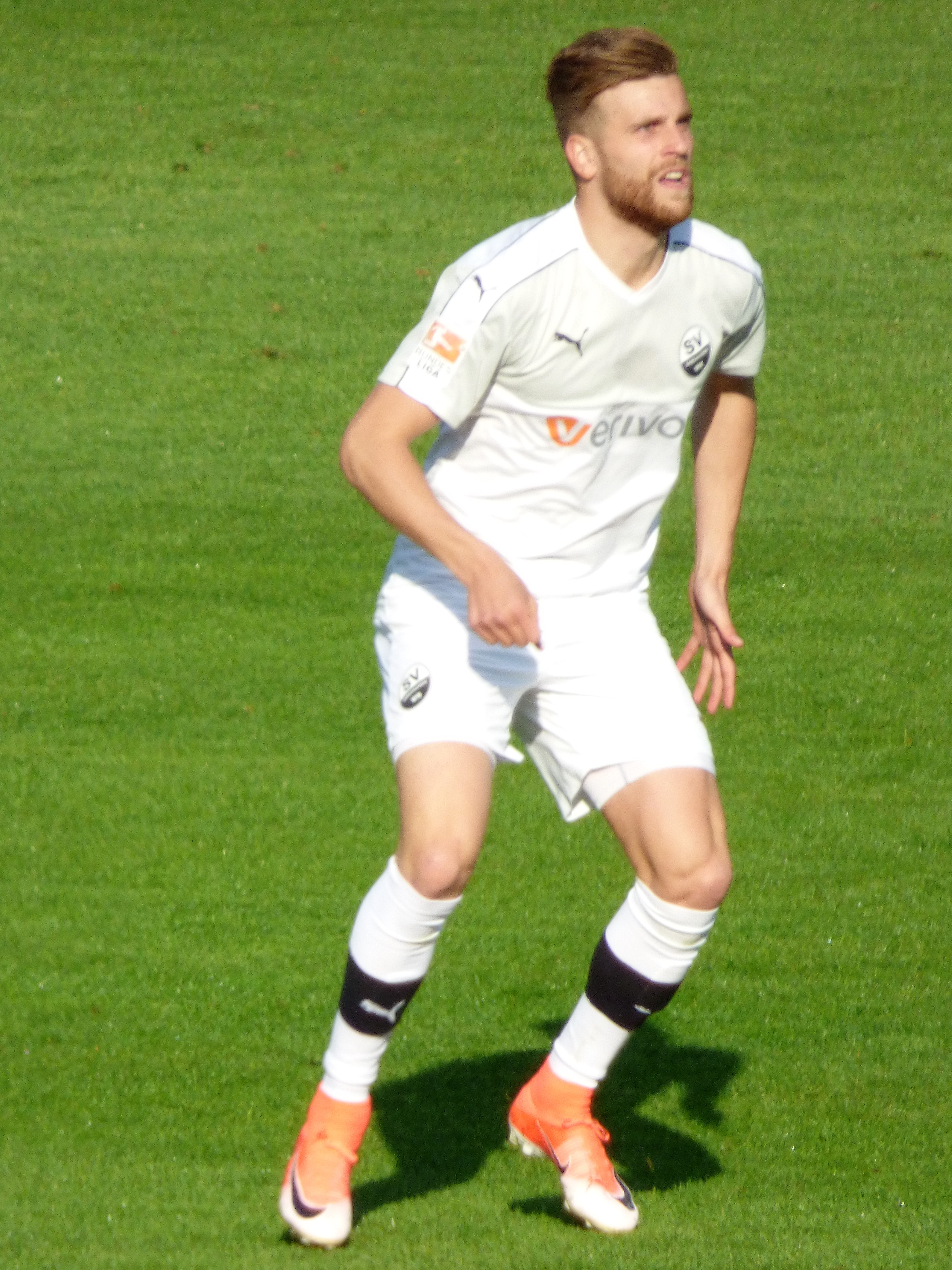 Lucas Höler im Trikot vom SV Sandhausen